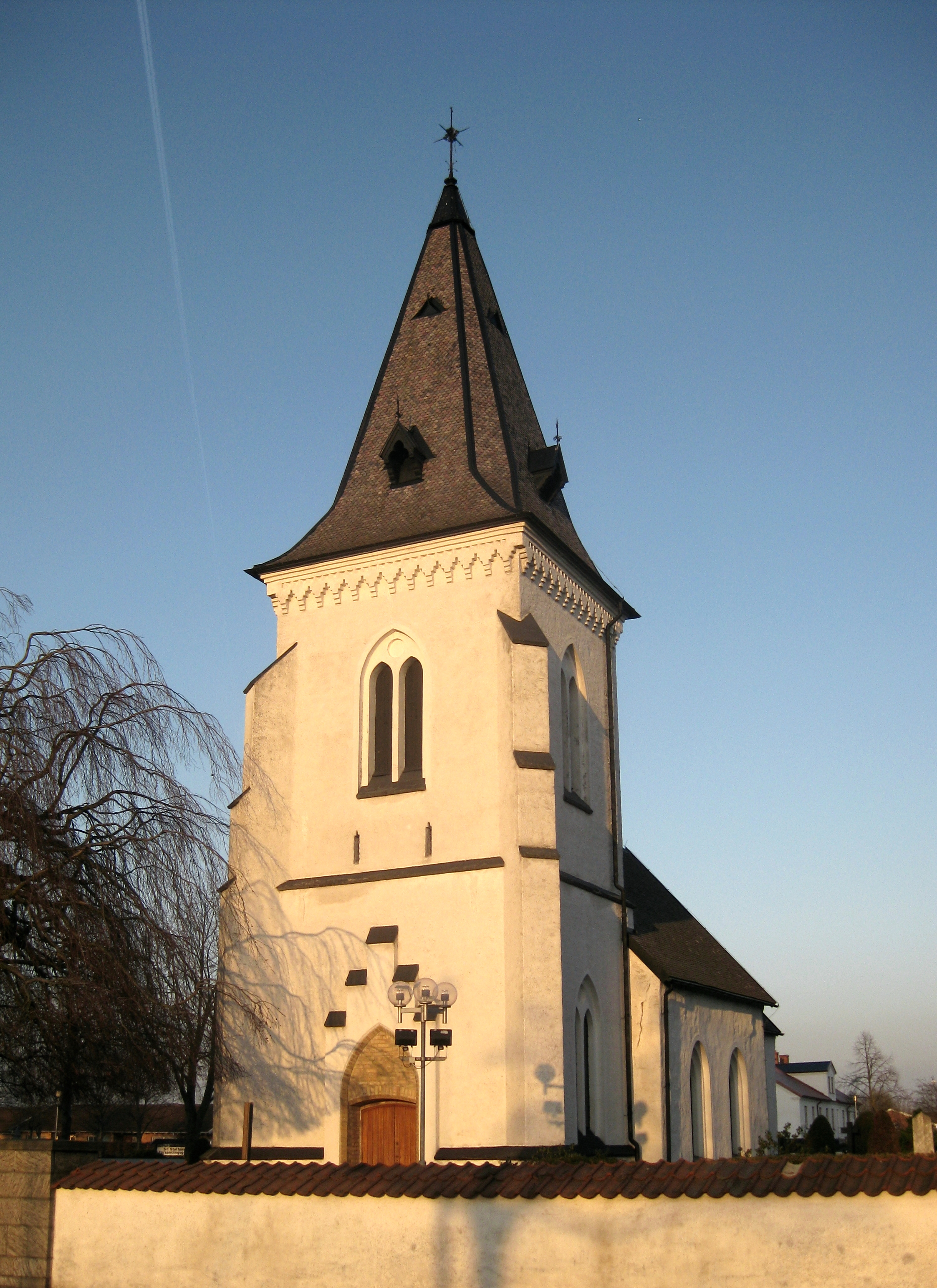 Brågarps kyrka i Staffanstorp